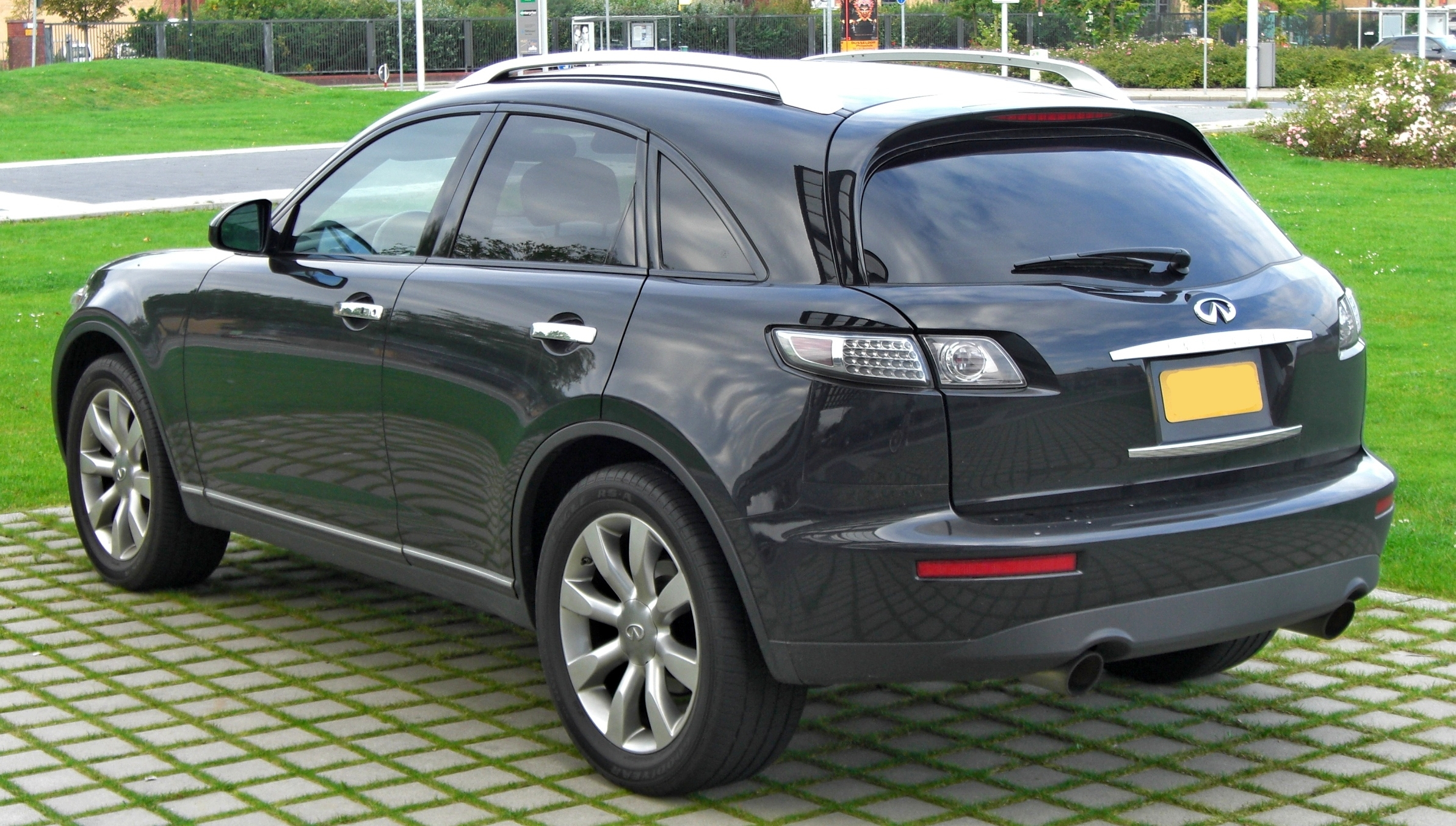 Infiniti FX